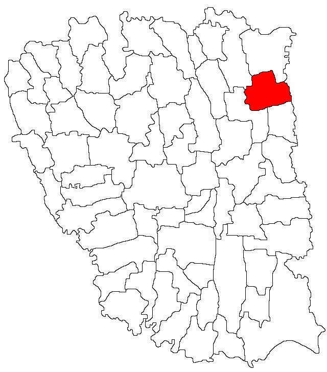 Categorie:Hărţi ale judeţului Galaţi